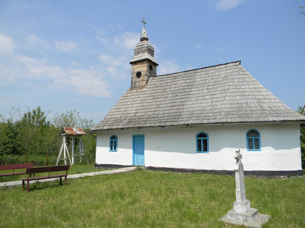 Biserica Ortodoxa Romana din satul Crivobara, Comuna Secas, Judetul Timis, Romania